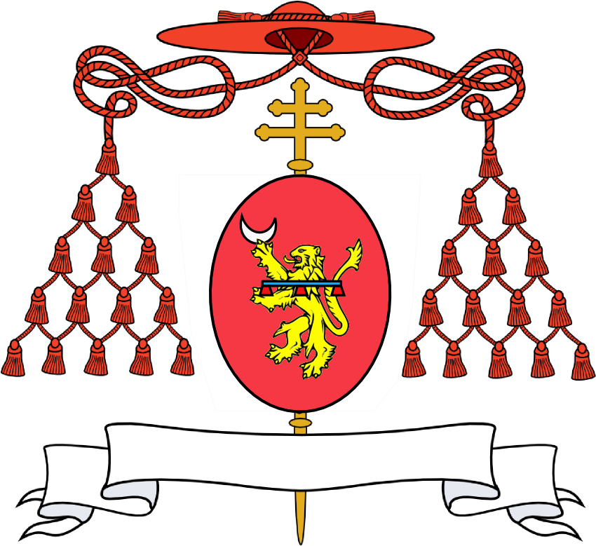 Stemma cardinalizio di Girolamo Seripando.